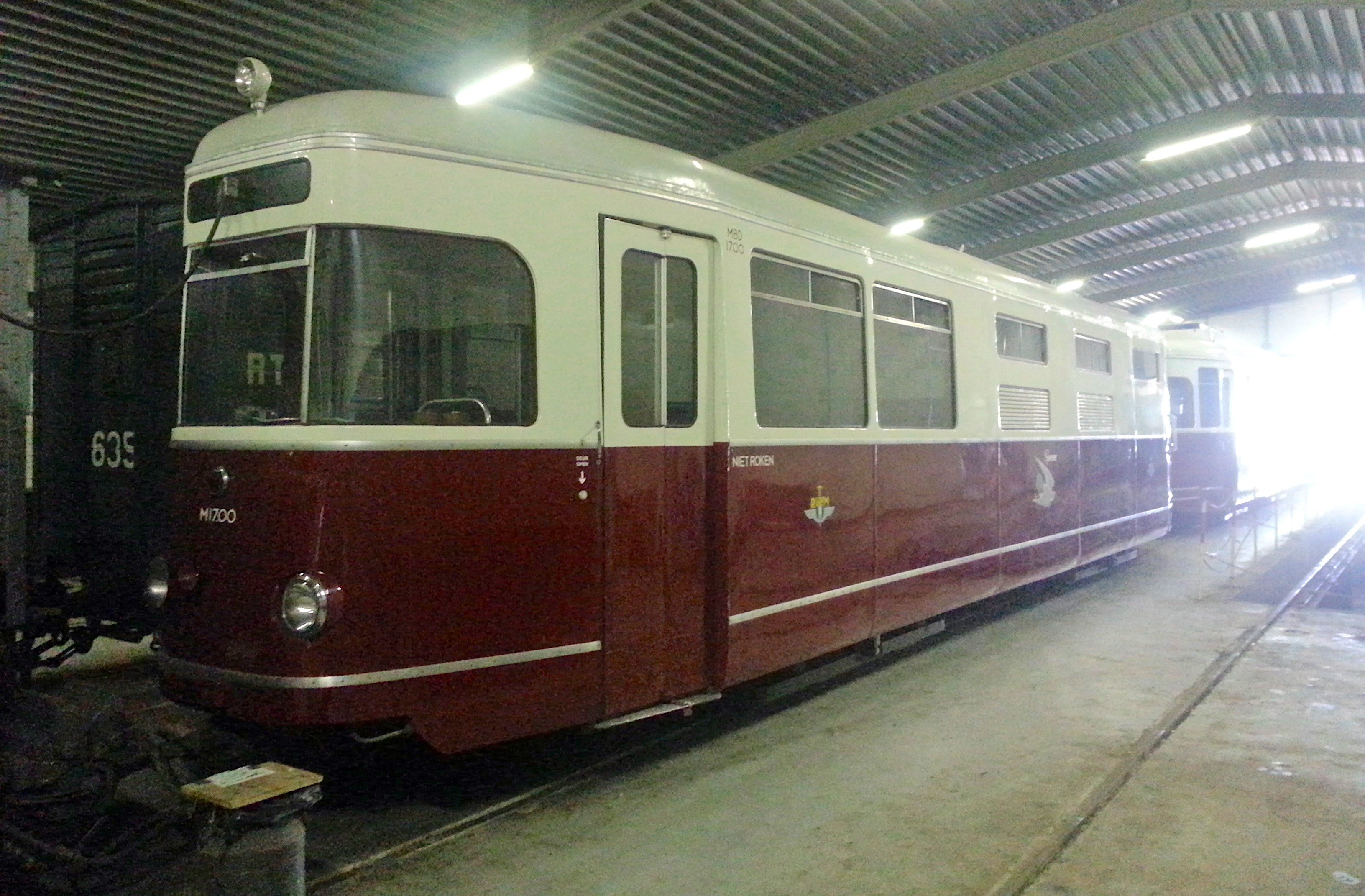 Een voertuig van de Stichting voorheen RTM in het depot in Ouddorp.